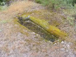 Necrópoles